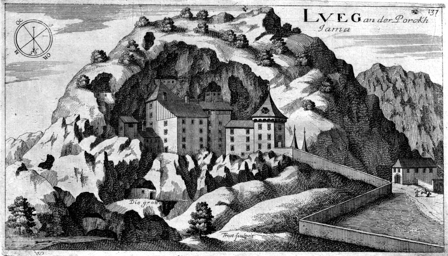 Predjamski grad